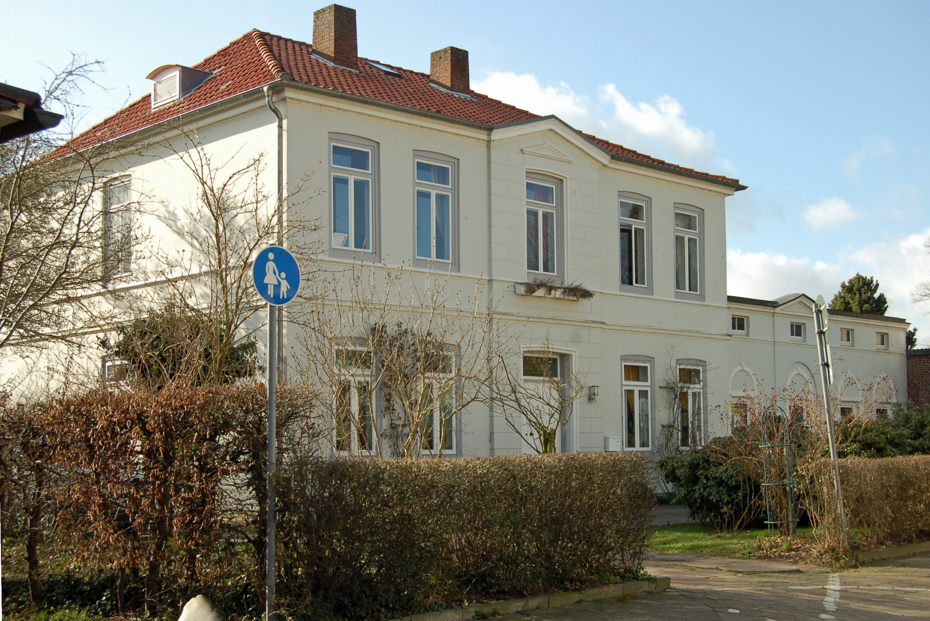 Das ehemalige Pastorat in Uetersen aus dem Jahr 1857. Das Gäbaüde steht wegen senem Historischen, Ortstypischen und Städtebaulichen Wert ald Kulturdenkmal unter Denkmalschutz.